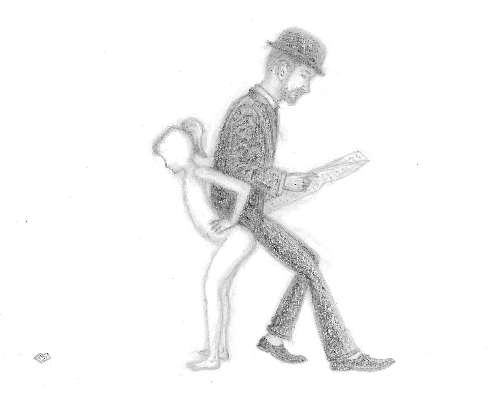 Meuble humain